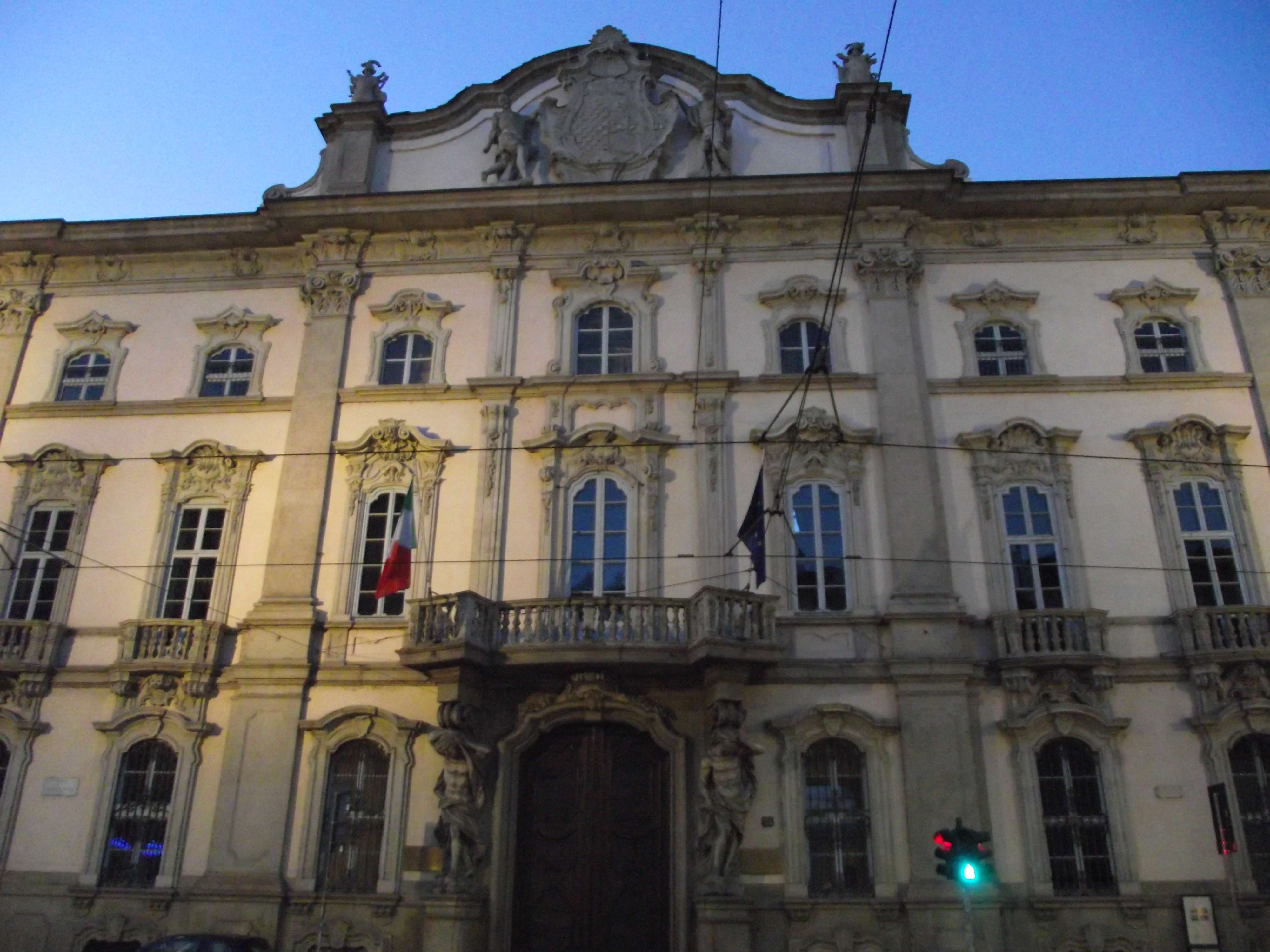 Facciata